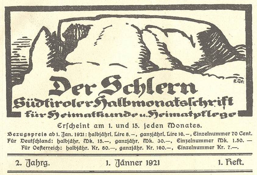 Illustrazione da Der Schlern